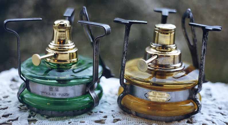 deux réchauds à alcool en verre Henri Gautreau